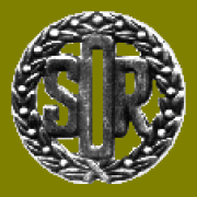 odznaka podchorążego Szkoły Oficerów Rezerwy (1974-1981), noszona na pagonach munduru